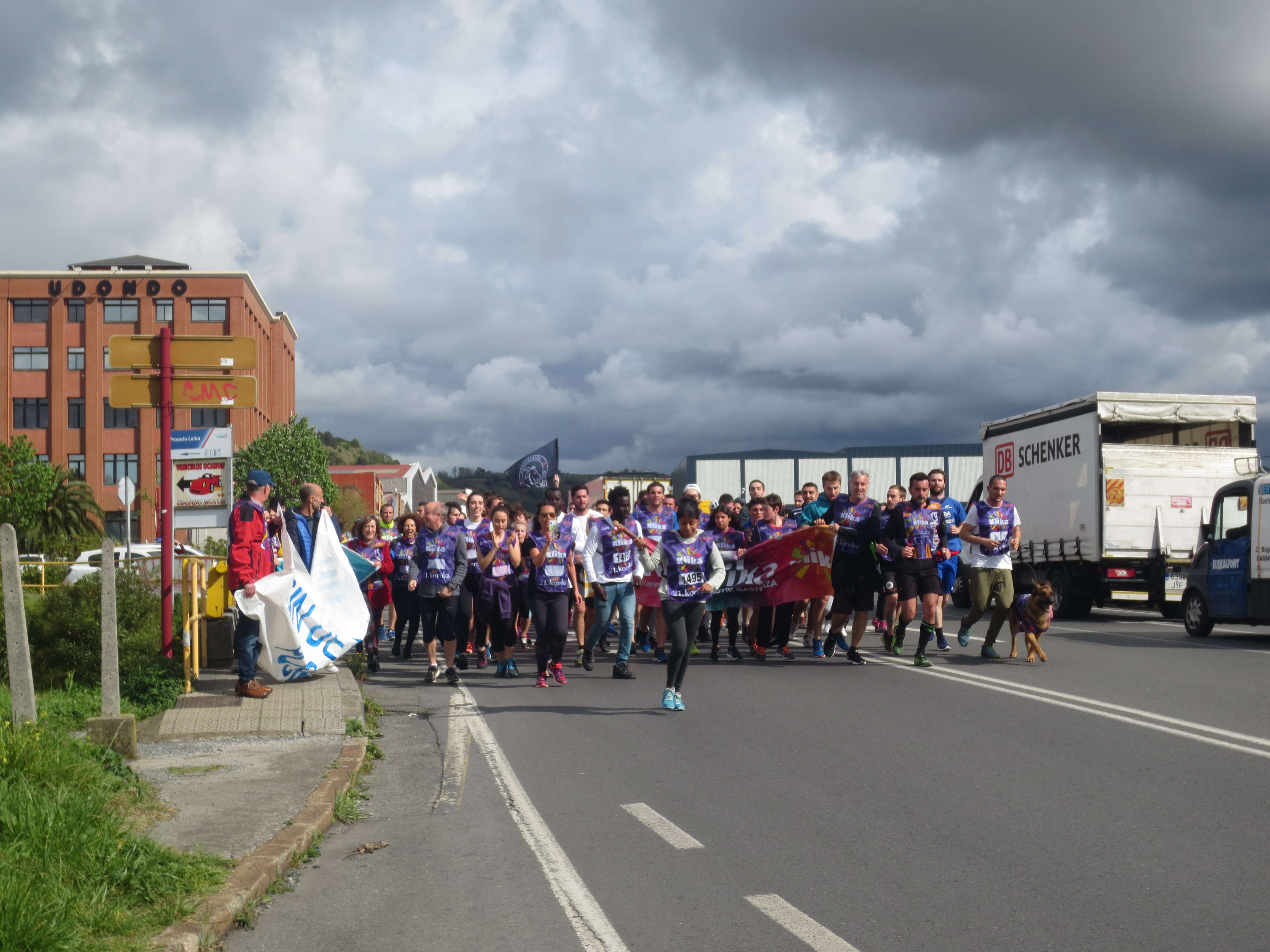 Korrika21 - Leioara iristen. Dow Chemical inguruan.